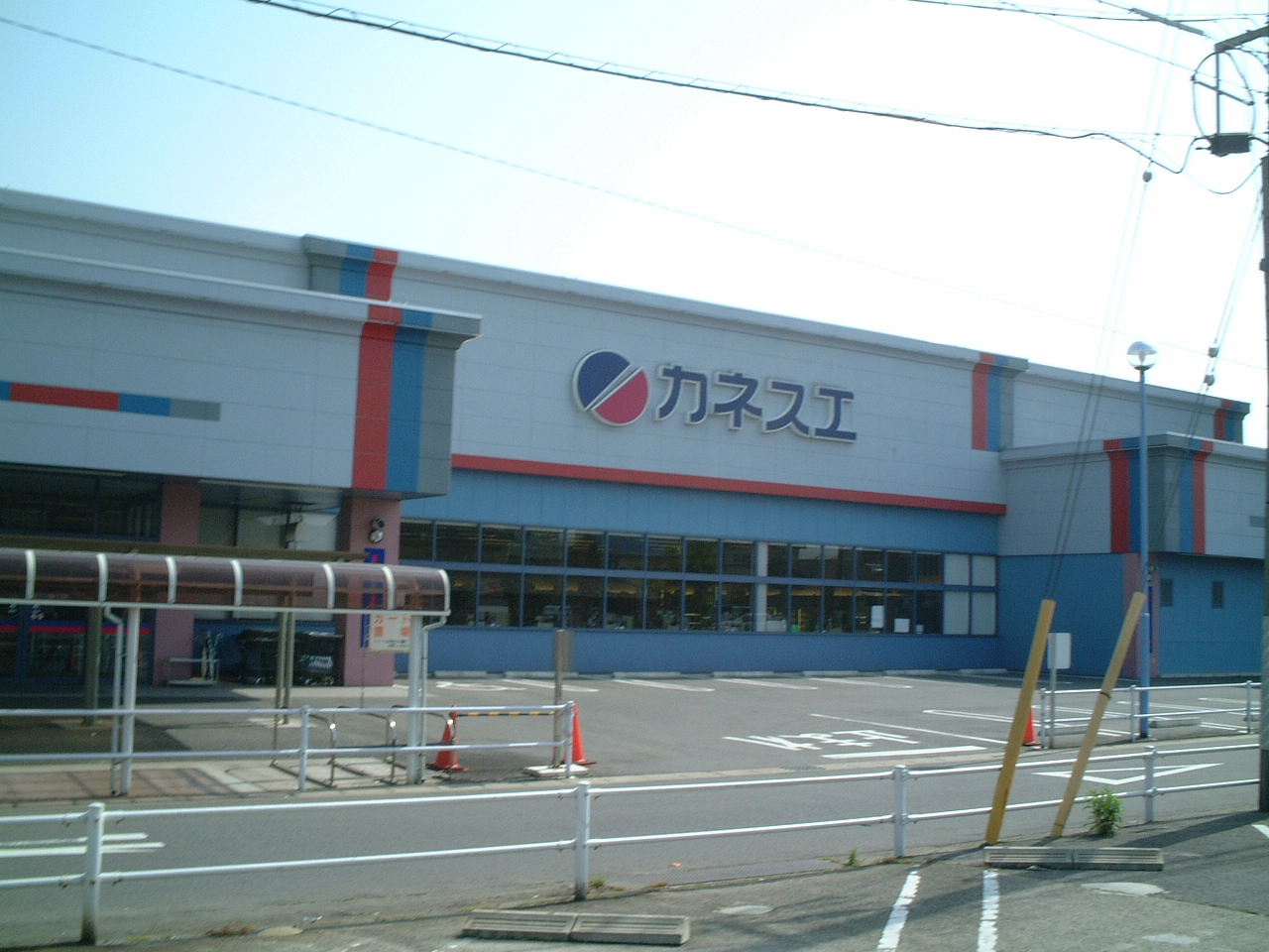 カネスエ宮西店の画像